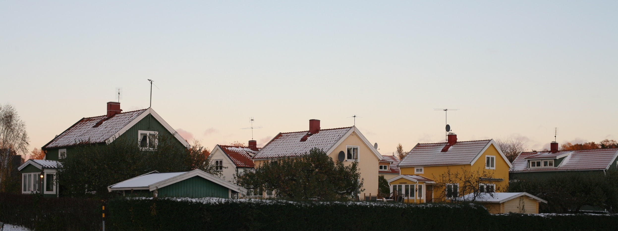 Villor i Enskede